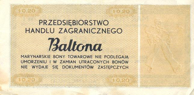 Mój banknot z niewykorzystanego dodatku dewizowego - skan rewersu